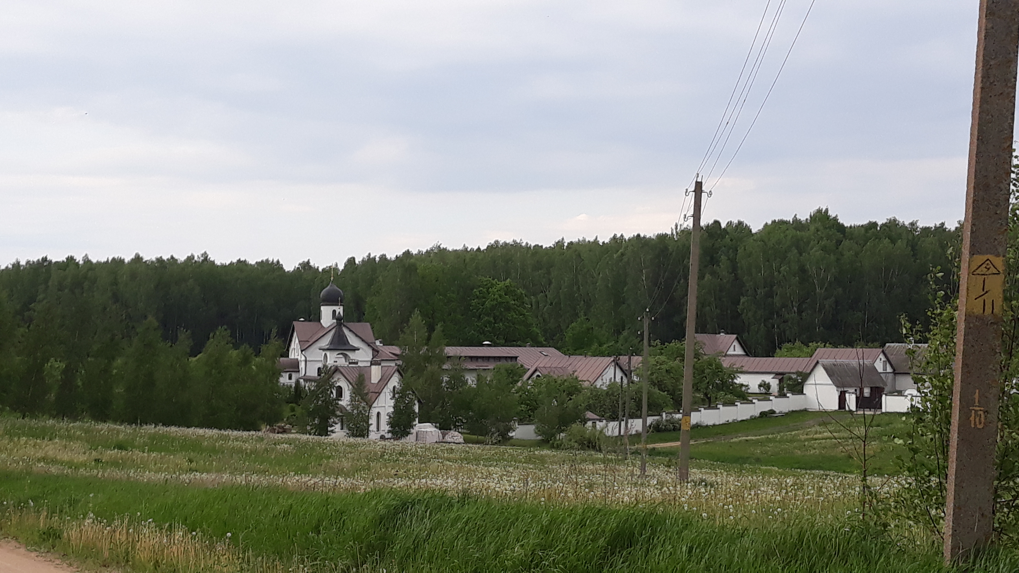 Жаночы манастыр